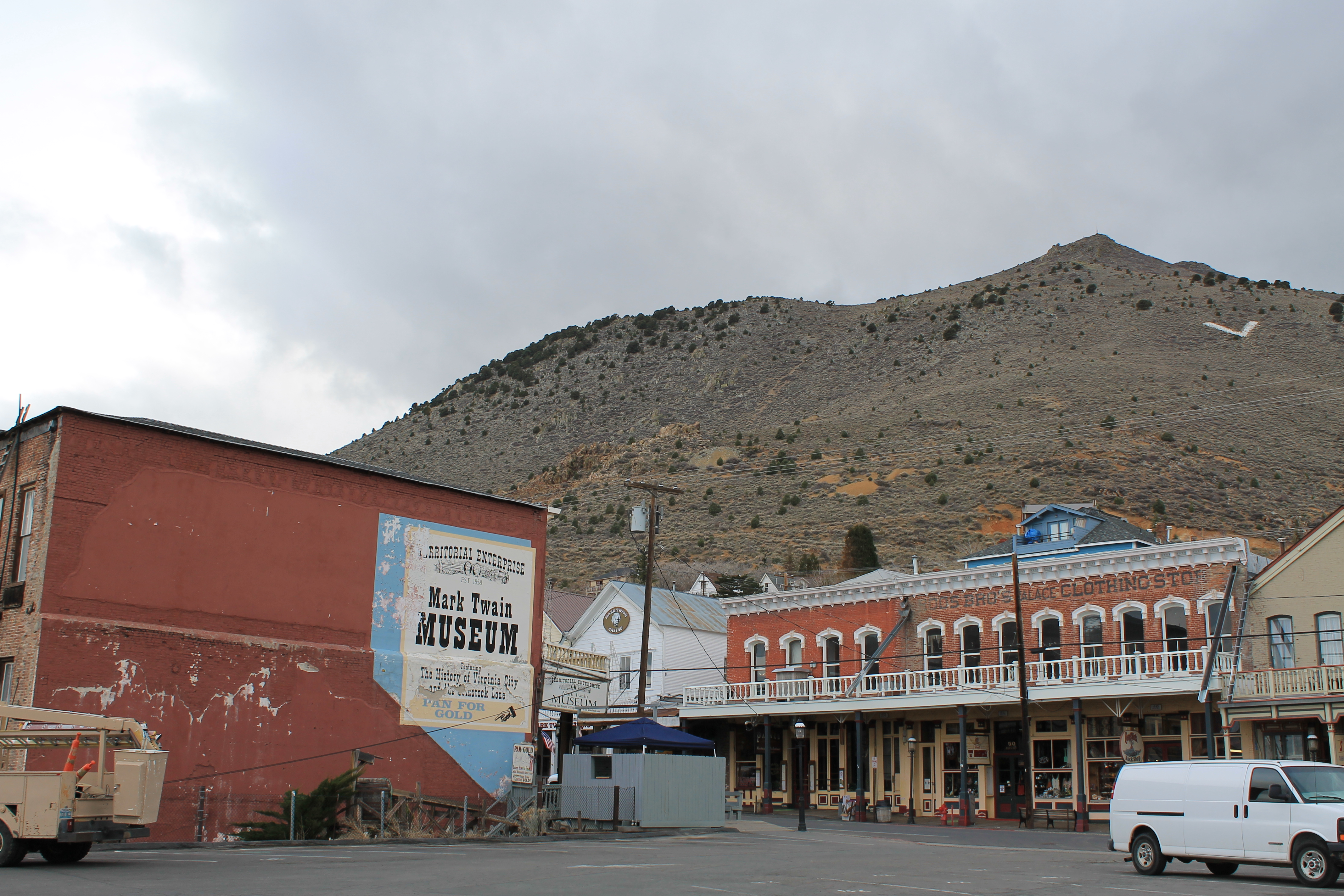 Virginia City